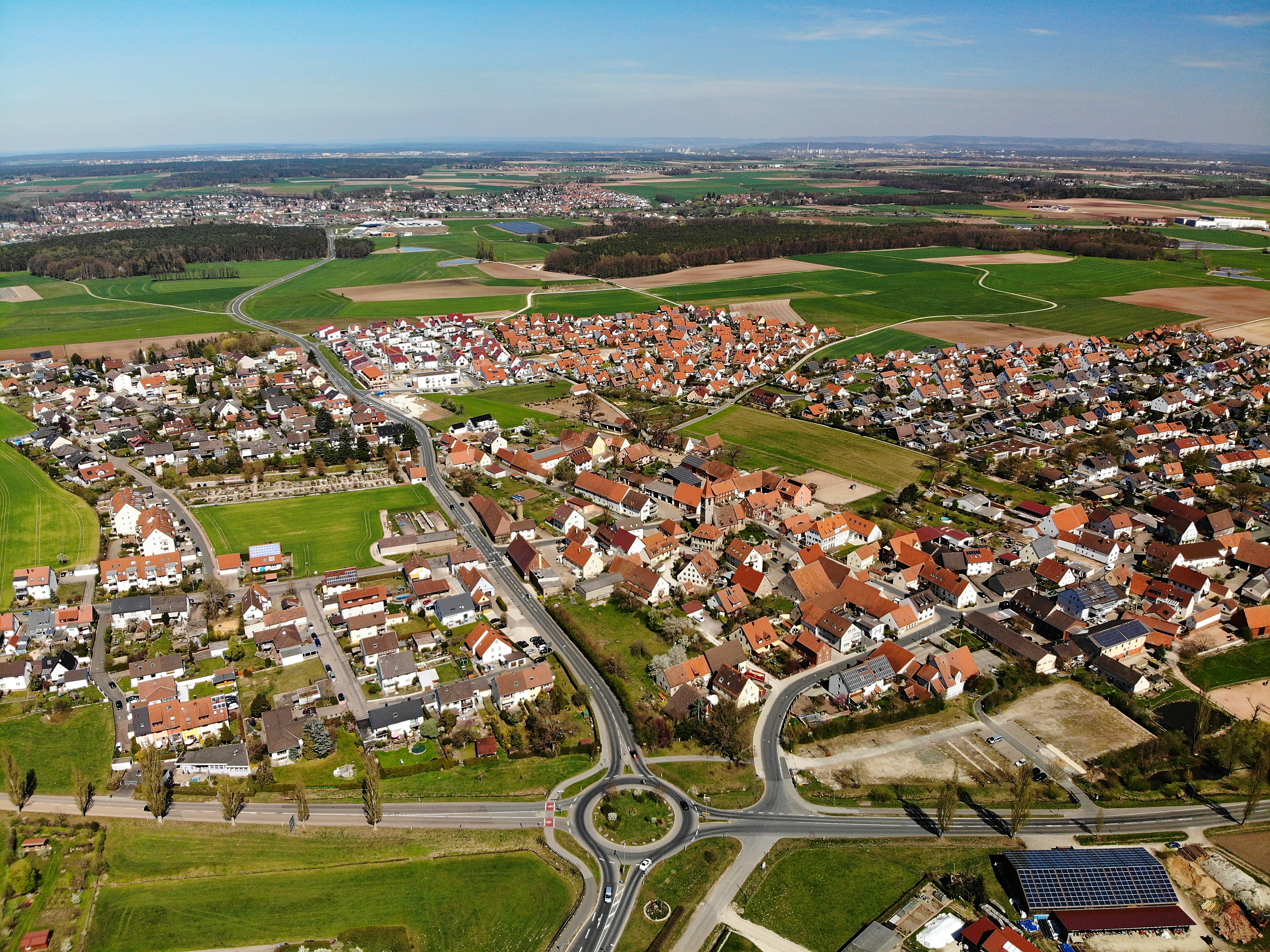 Seukendorf (Cadolzburg) Luftaufnahme (2020)